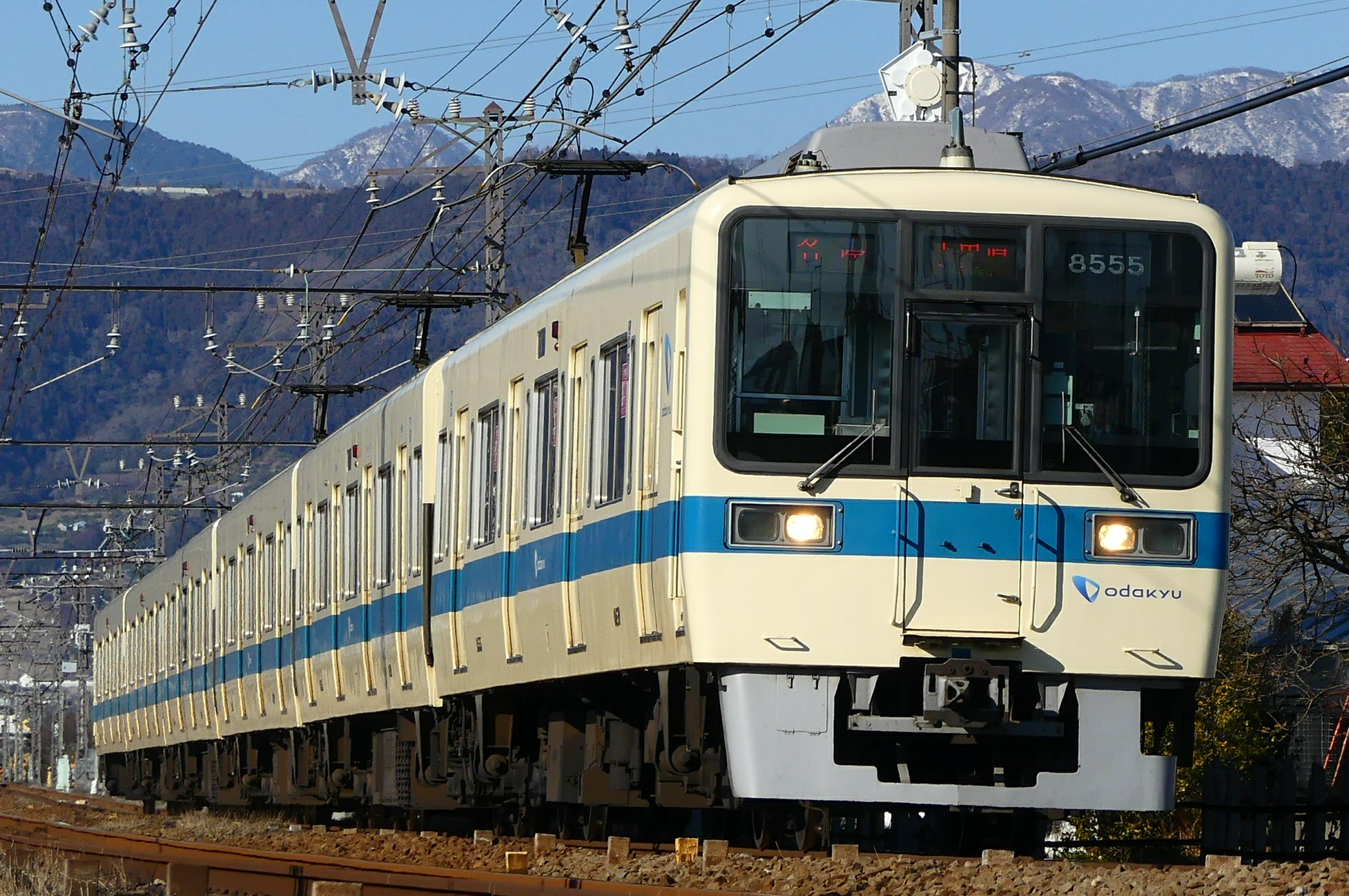 小田急電鉄8000形